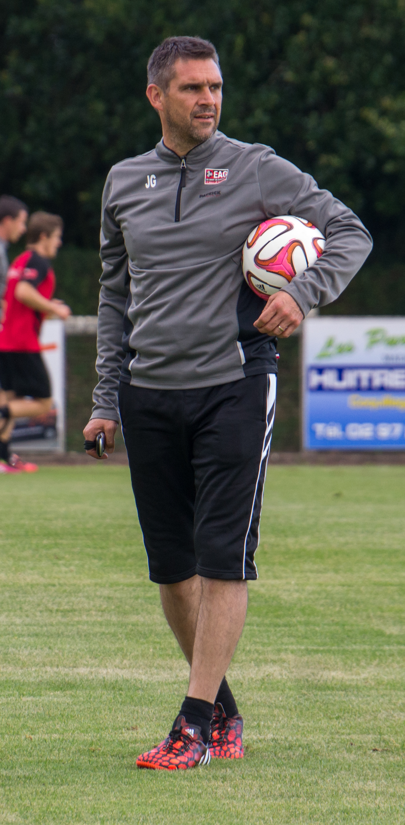 Jocelyn Gourvennec à l'entrainement le 11 juillet 2014